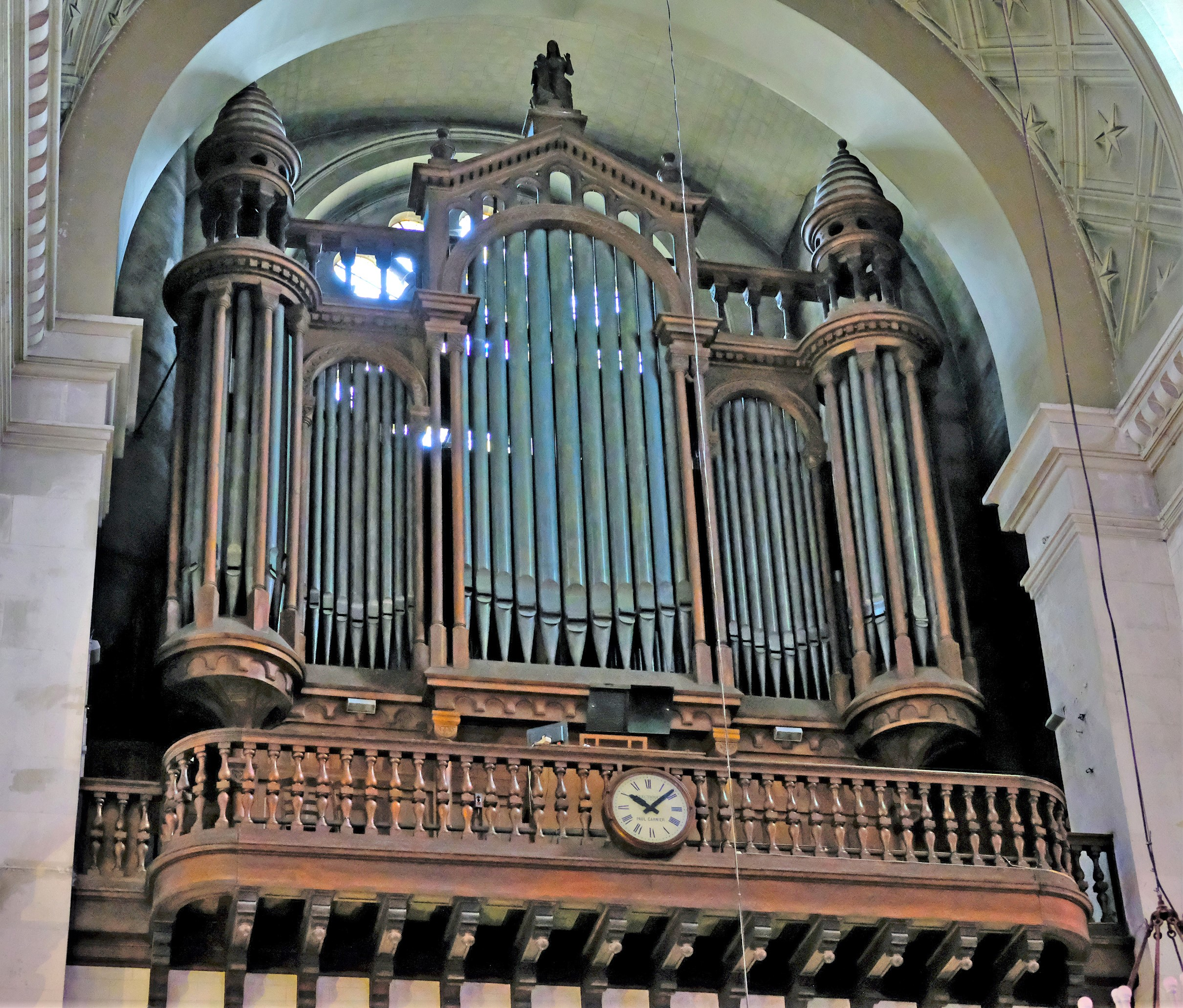 Église Sainte-Anne de la Butte-aux-Cailles (orgue de tribune) - Paris XIII